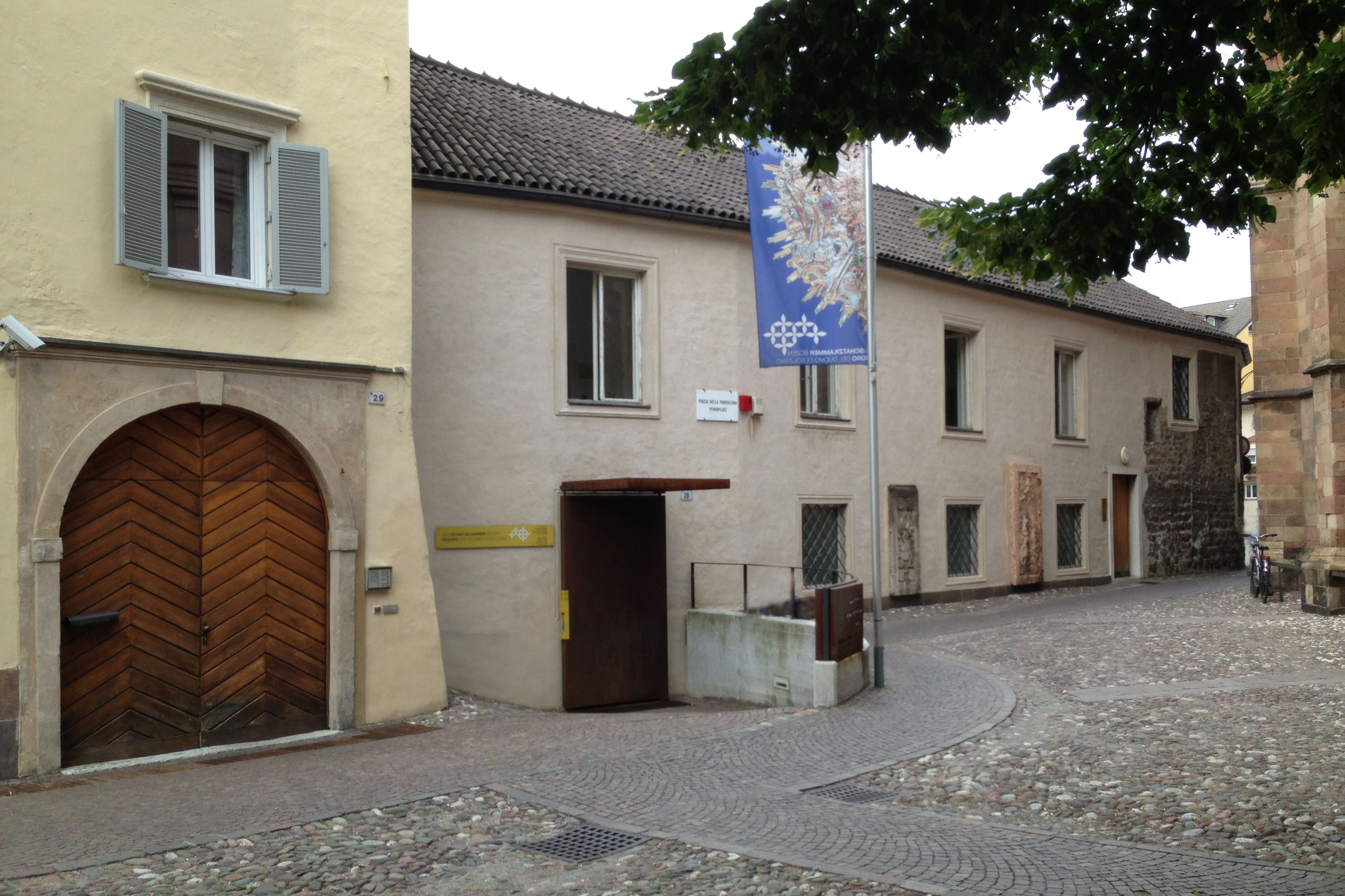 Propstei Bozen, Pfarrplatz 27-31